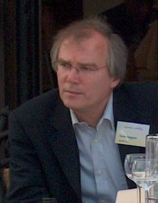 Kees Neggers in Bad Nauheim in 2003